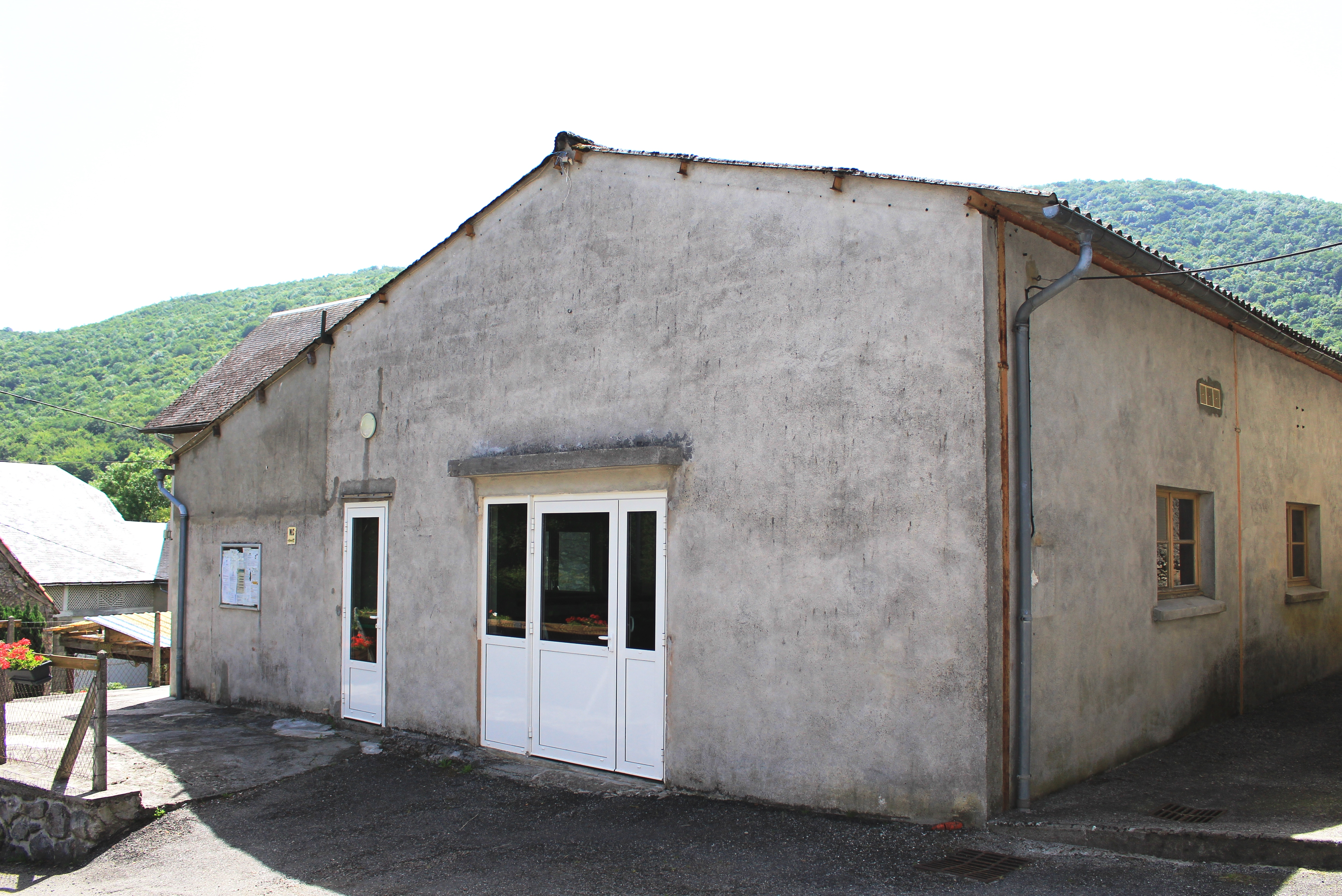 Salle des fêtes de Gazave (Hautes-Pyrénées)